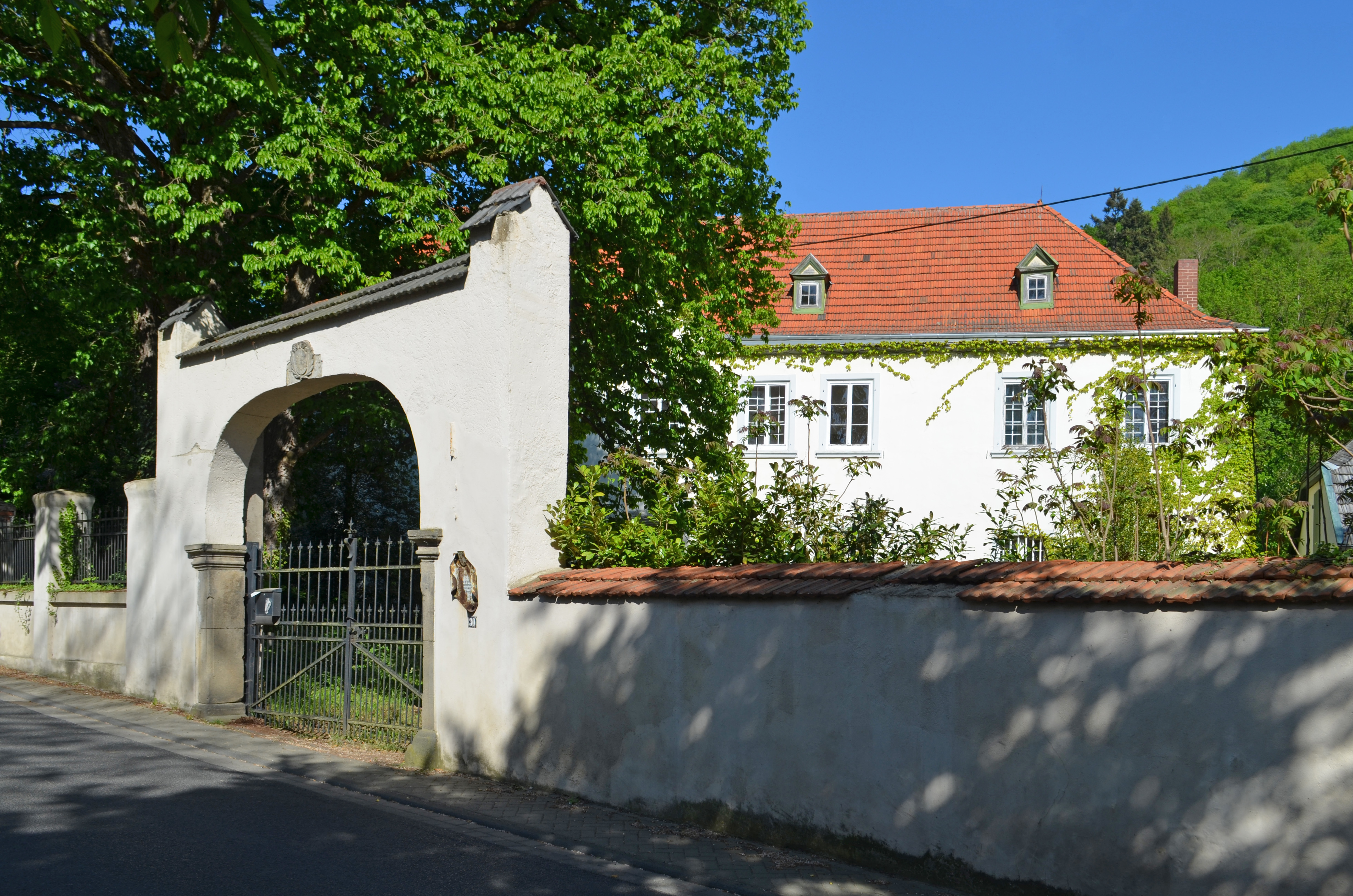 Bad Neuenahr-Ahrweiler, Ortsteil Heppingen, "Schloss Metternich"